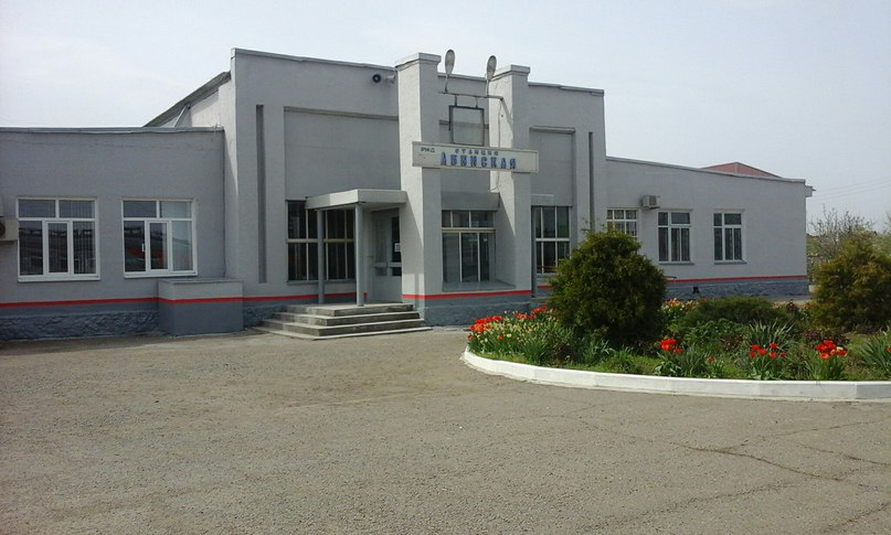 Здание вокзала станции Абинская в Краснодарском крае.